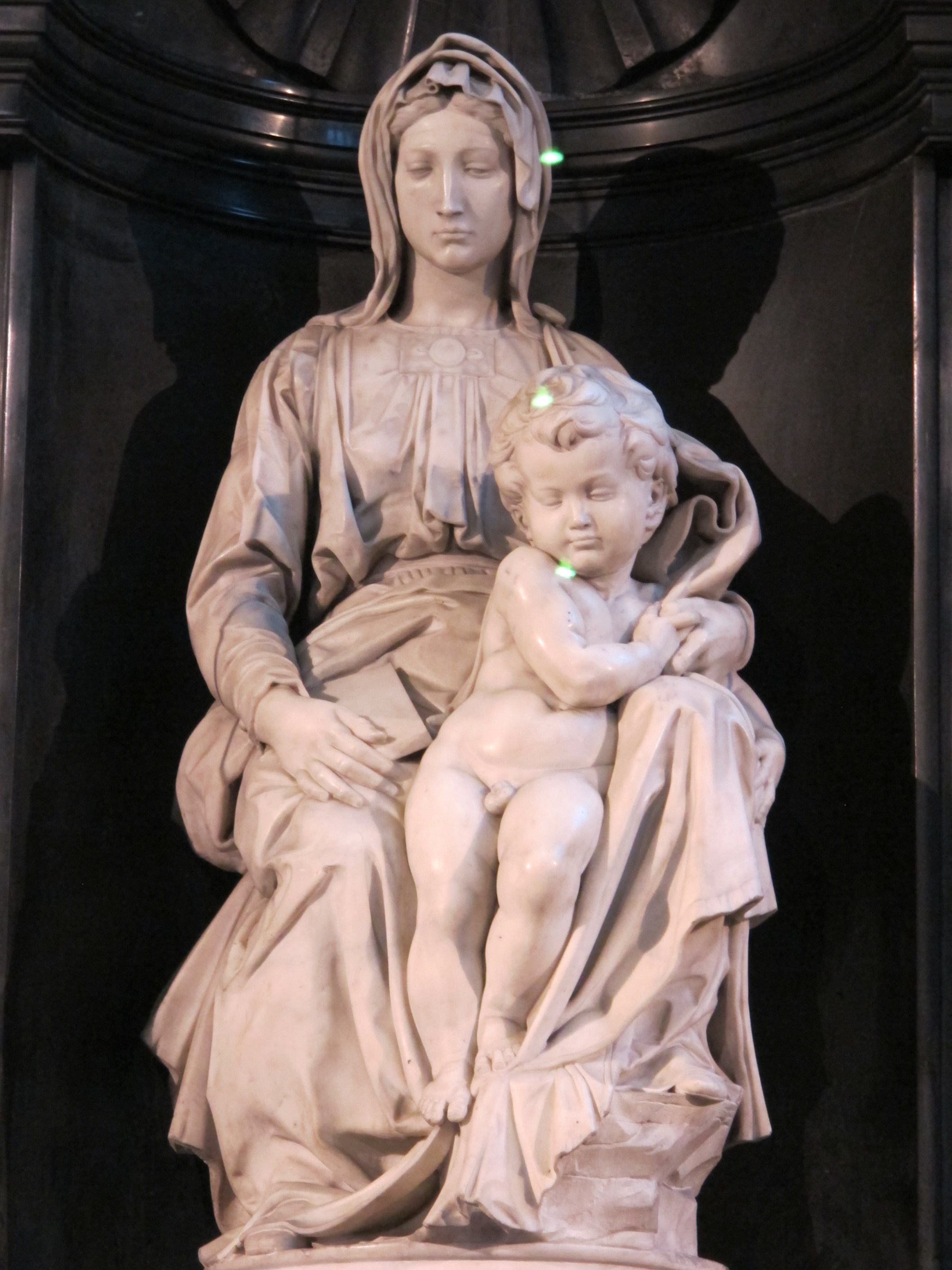 Chiesa di nostra signora, bruges, int., madonna di bruges